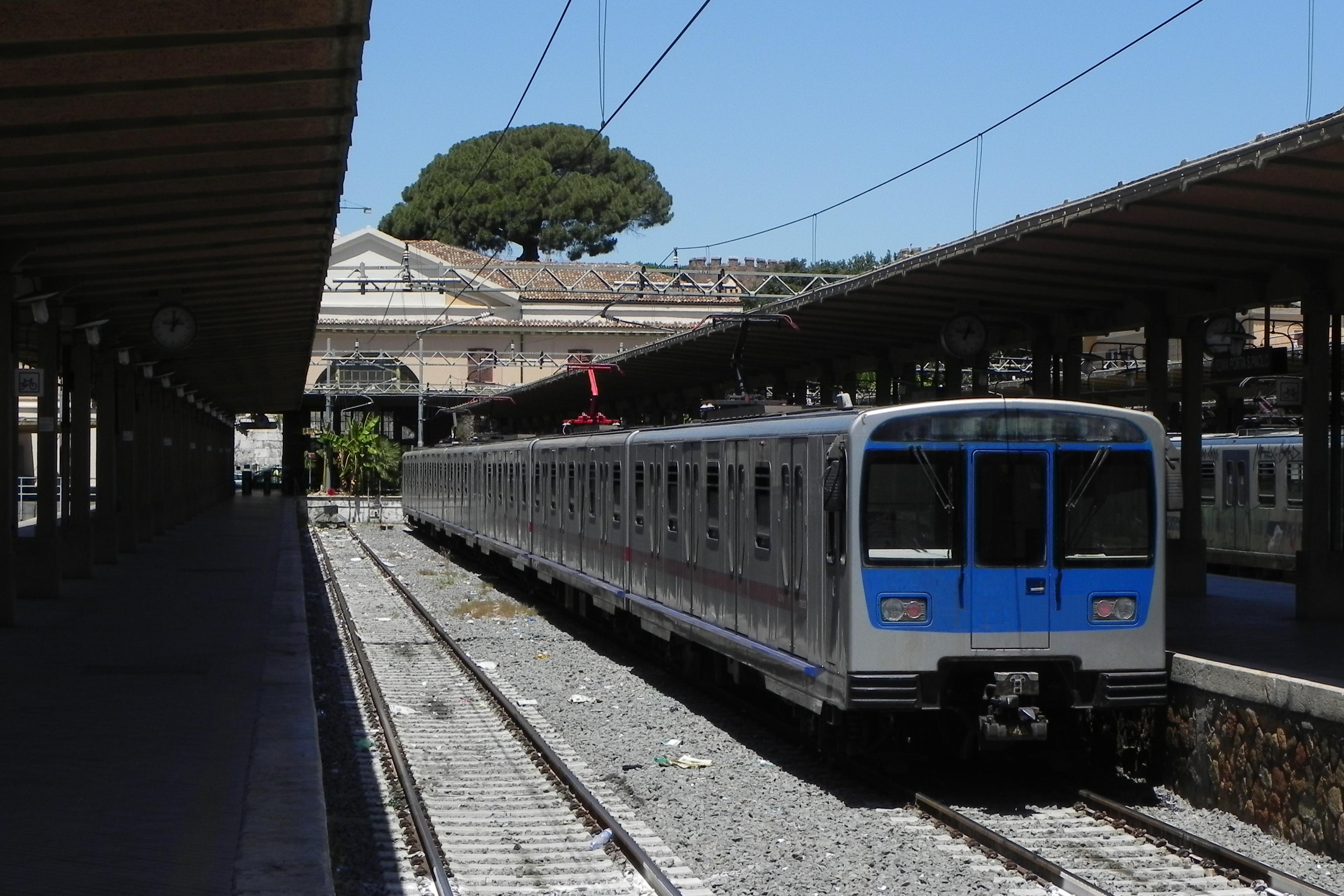 La stazione della Roma-Lido, a Porta San Paolo.